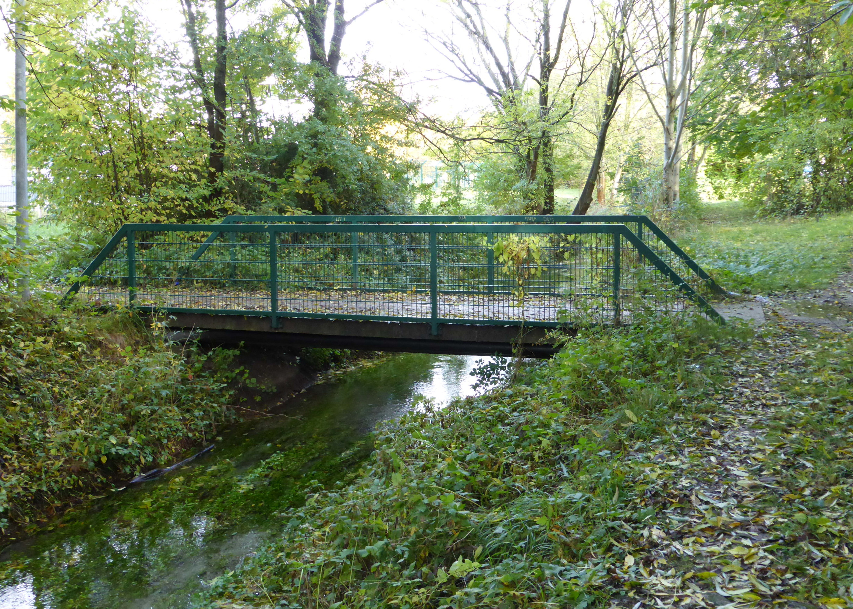 Steg über das Schwabenbächl in München.